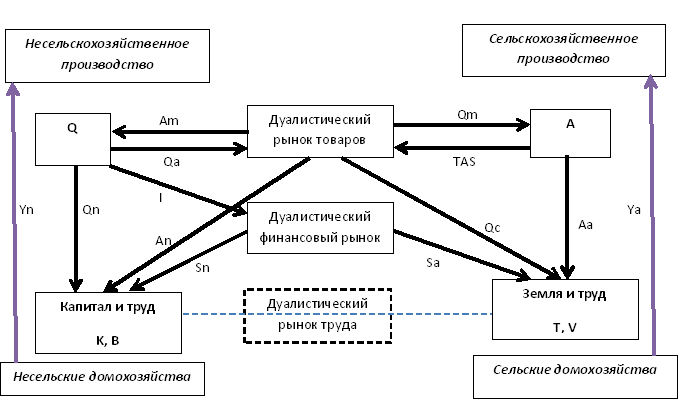 Дуализм по Ранису